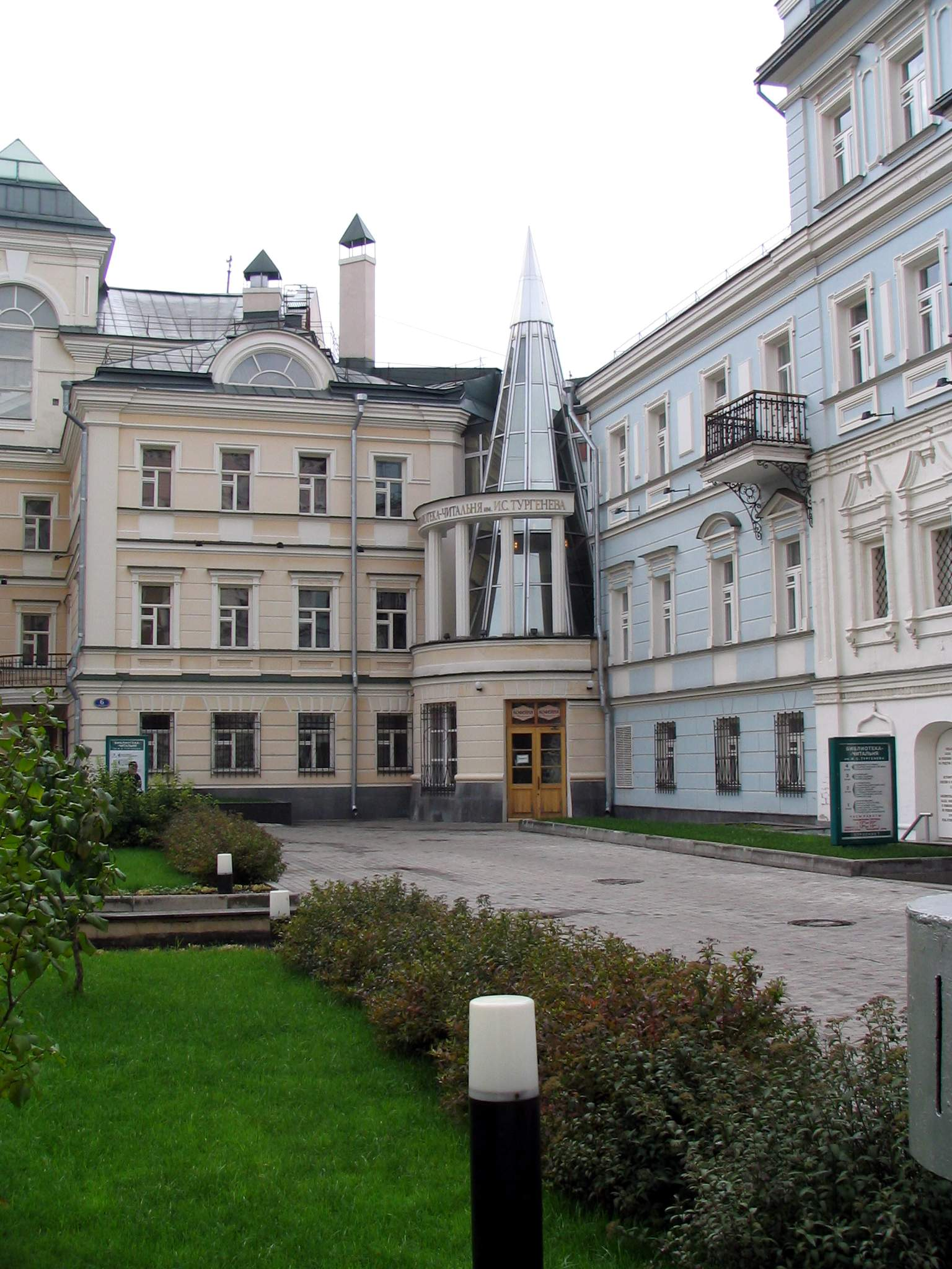 Bobrov,6